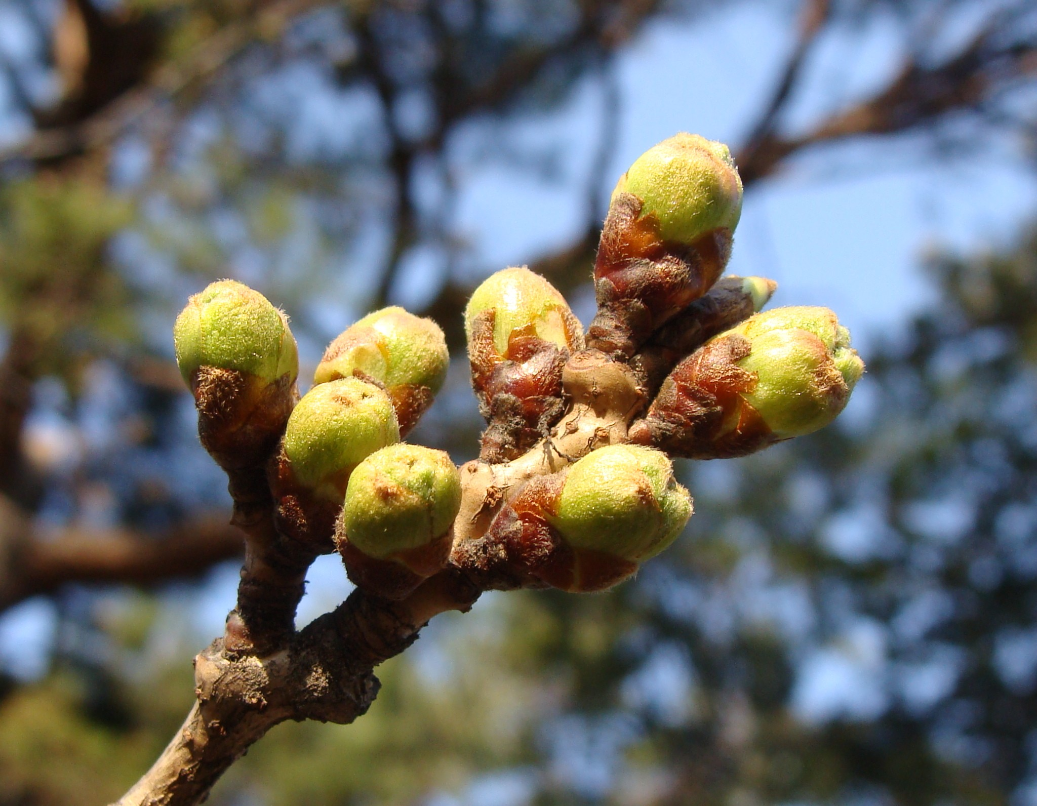 Prunus_Sprout（サクラの花芽）